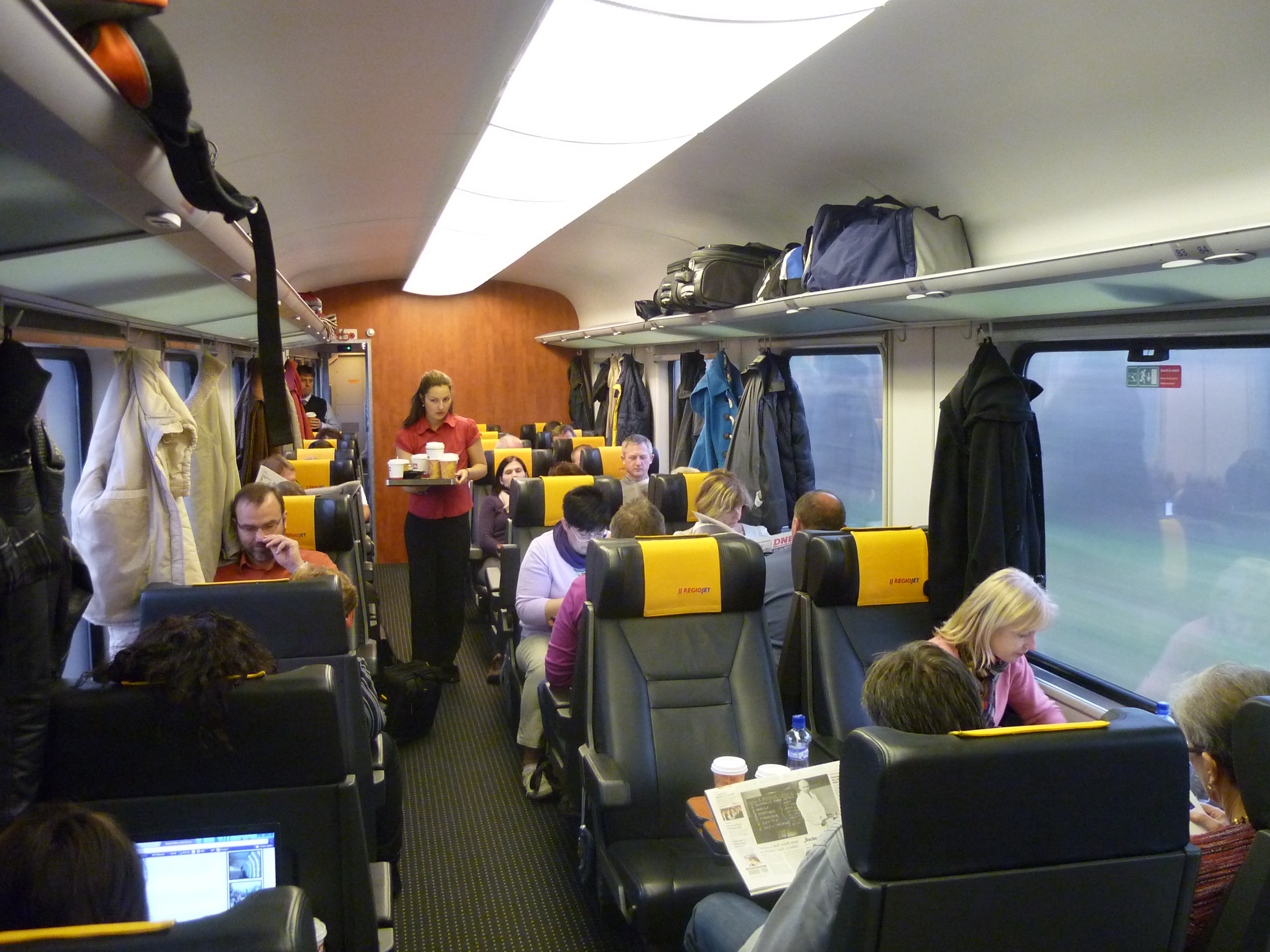 Interioro de vagono de RegioJet, ĉeĥa privata fervoja kompanio